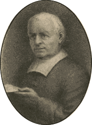 François Dollier de Casson, French priest and explorer in New France